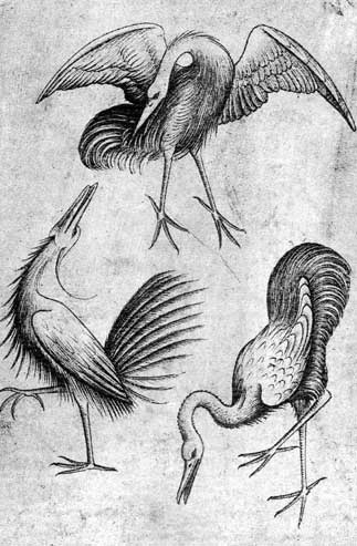 Vogel Drei